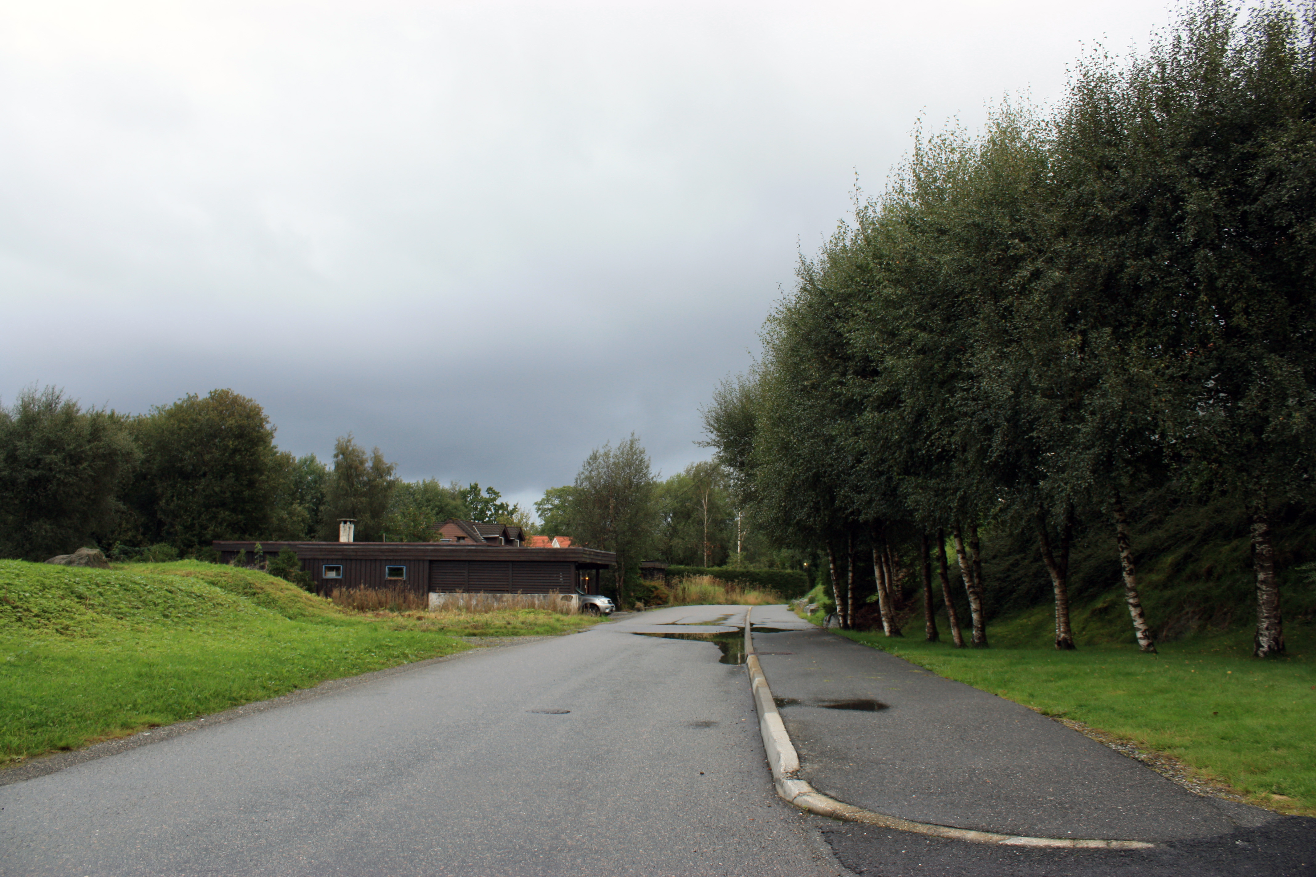 Sleipners veg, Fana, Bergen.